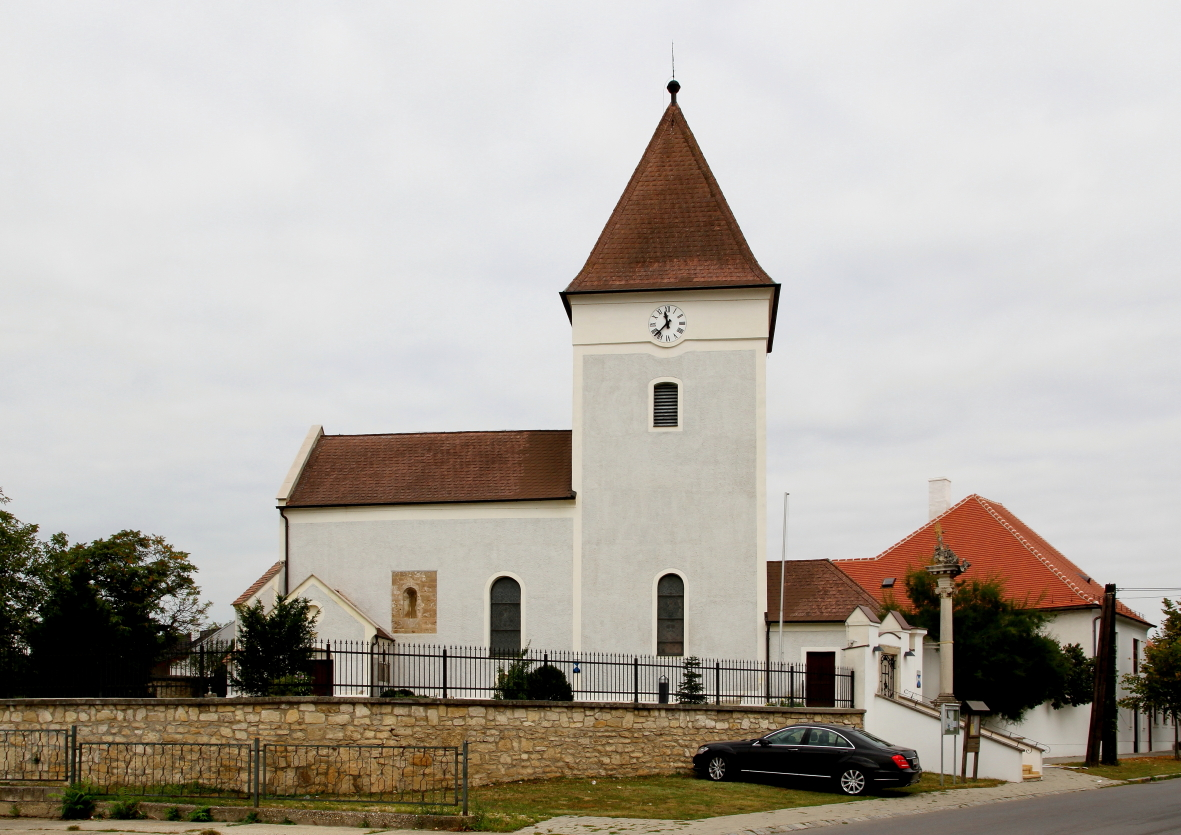 Die katholische Pfarrkirche hl. Jakobus d. Ä. in der burgenländischen Gemeinde Gols.